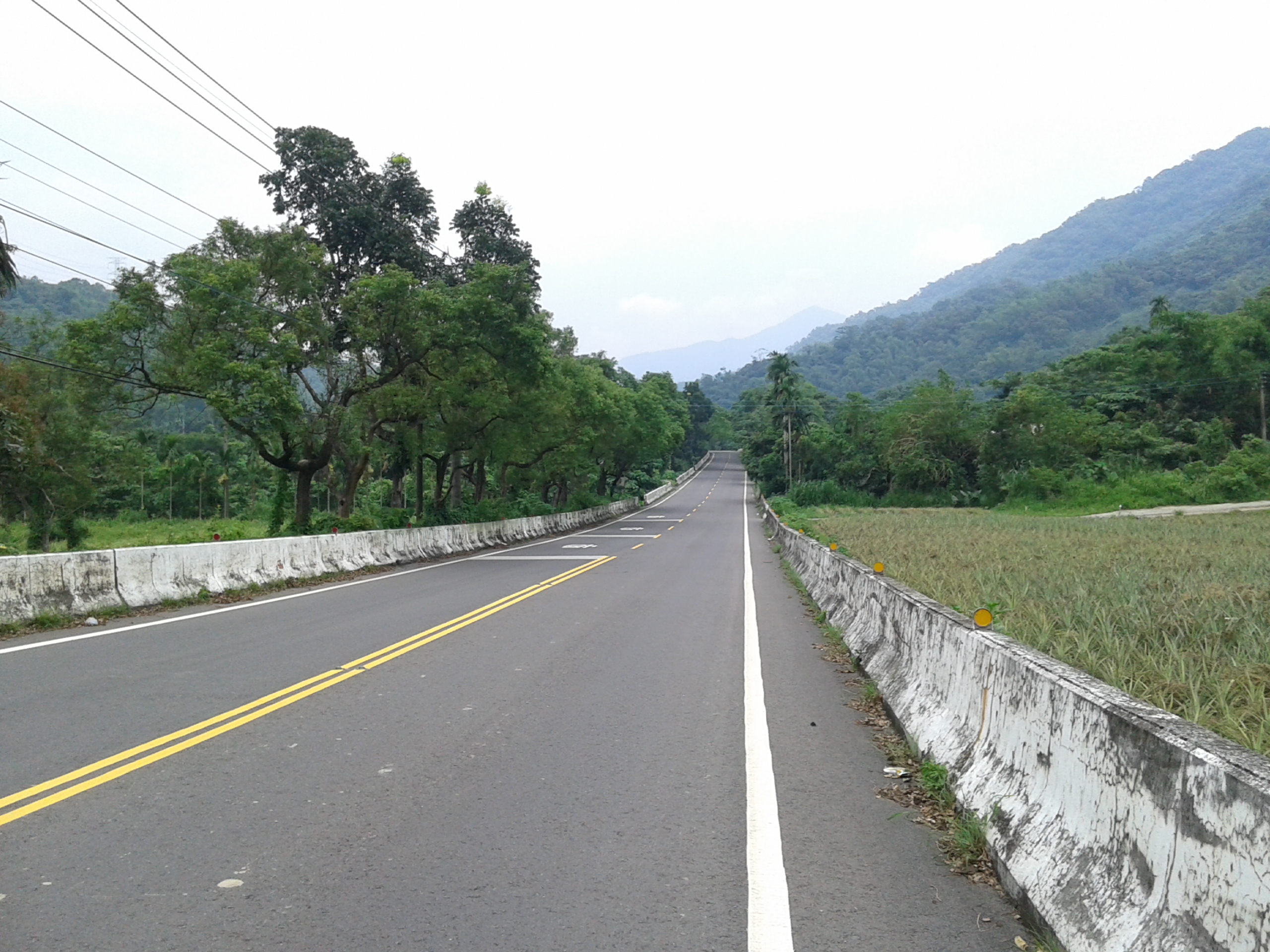 縣道185號佳義路段